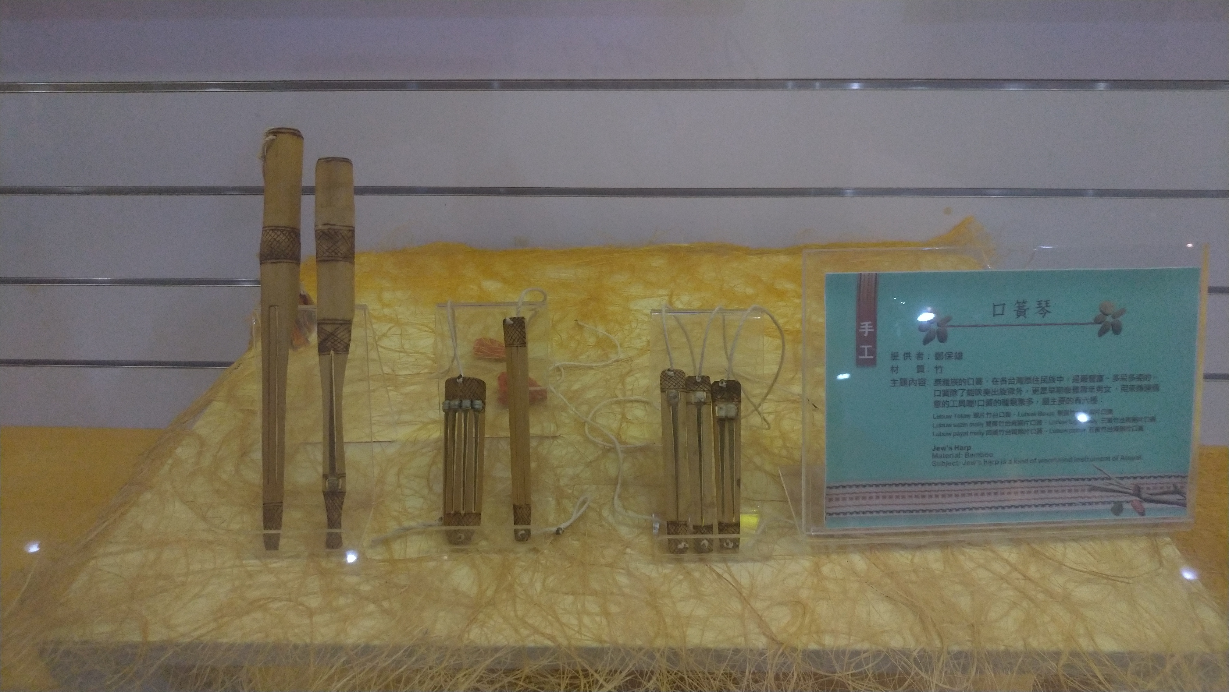 中文（台灣）: 台灣原住民，手工，口簧琴